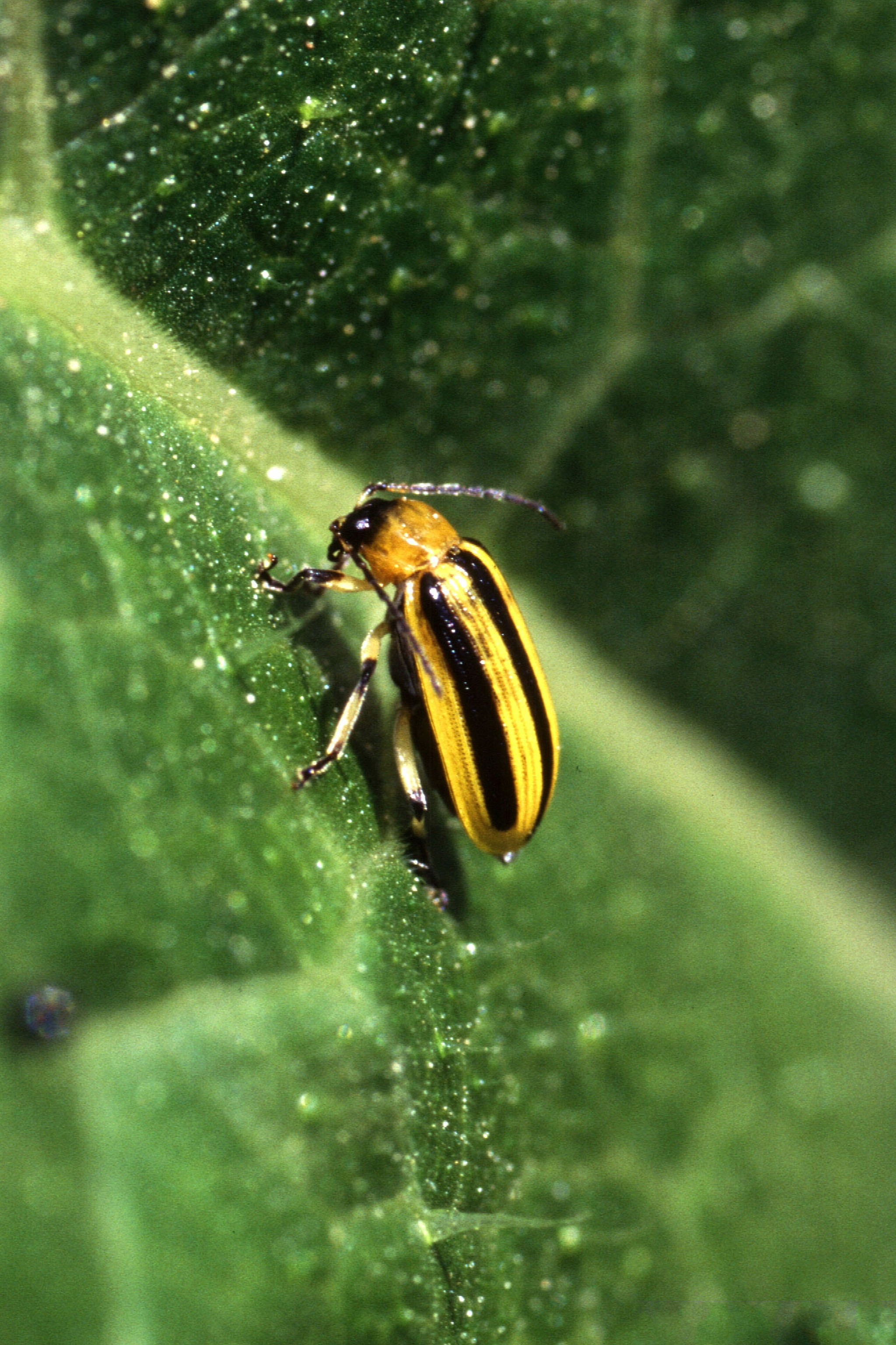 Acalymma vittatum Fabricius Common Name: striped cucumber beetle Photographer: Scott Bauer, USDA Agricultural Research Service, United States Contact: USDA ARS Photo Unit, USDA Agricultural Research Service Descriptor: Adult(s) Image taken in: United States